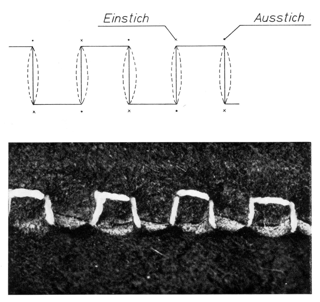 Nähte in der Kürschnerei: Absatz „Nähtechnik, Ledernähte, Polnische Naht“.